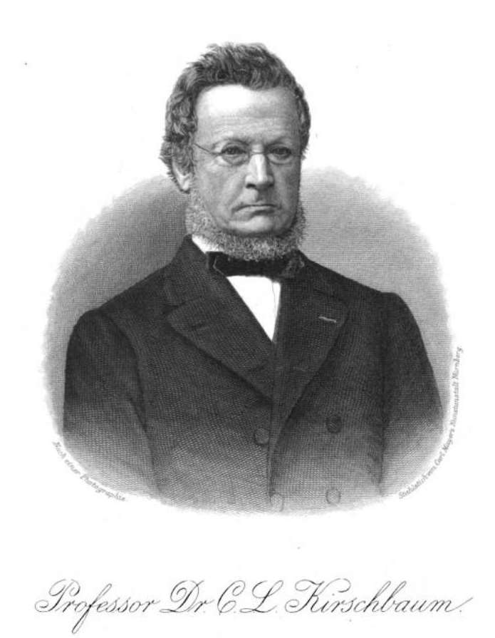 Carl Ludwig Kirschbaum (31. Januar 1812 - 3. März 1880) deutscher Biologe und Entomologe. Aus: Jahrbücher des Nassauischen Vereins für Naturkunde. Herausgegeben von Arnold Pagenstecher. Jahrgang 35. Julius Niedner Verlagshandlung, Wiesbaden 1882 Nach einer Photographie. Stahlstich von Carl Mayers Kunstanstalt Nürnberg.